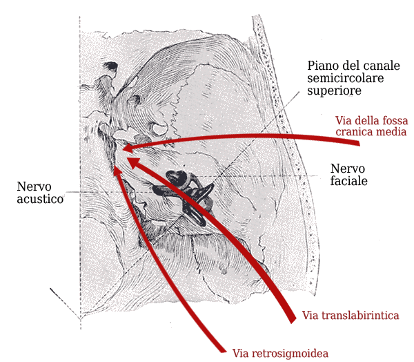 Neuroma dell'acustico - Approcci chirurgici